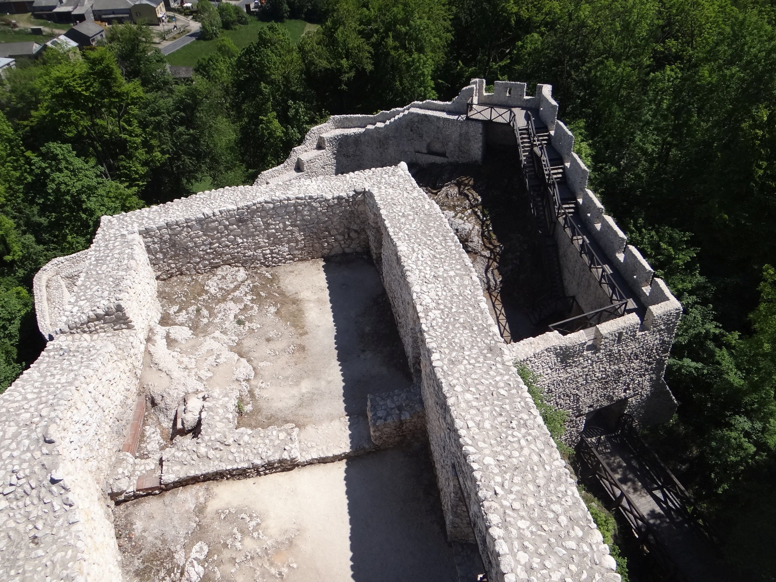 Zamek w Smoleniu (Zamek Pilicz)